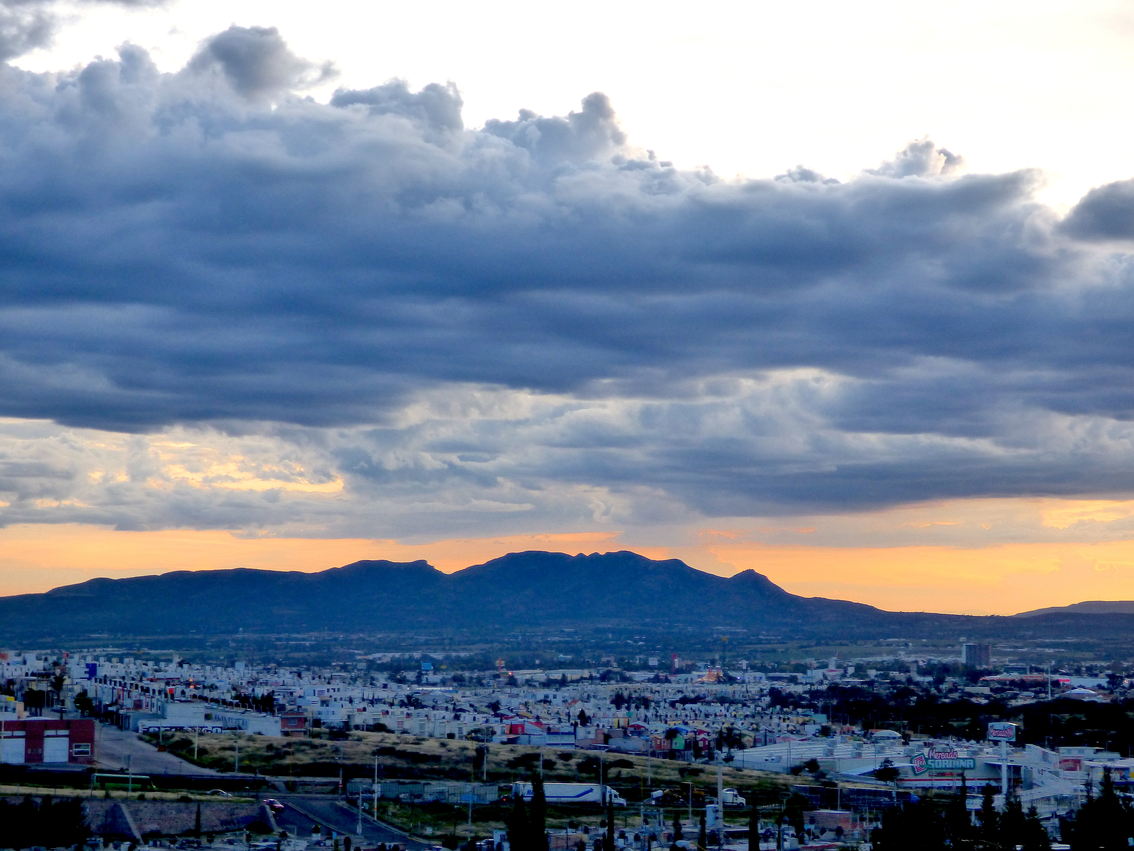 Atardecer en el Cerro del Muerto